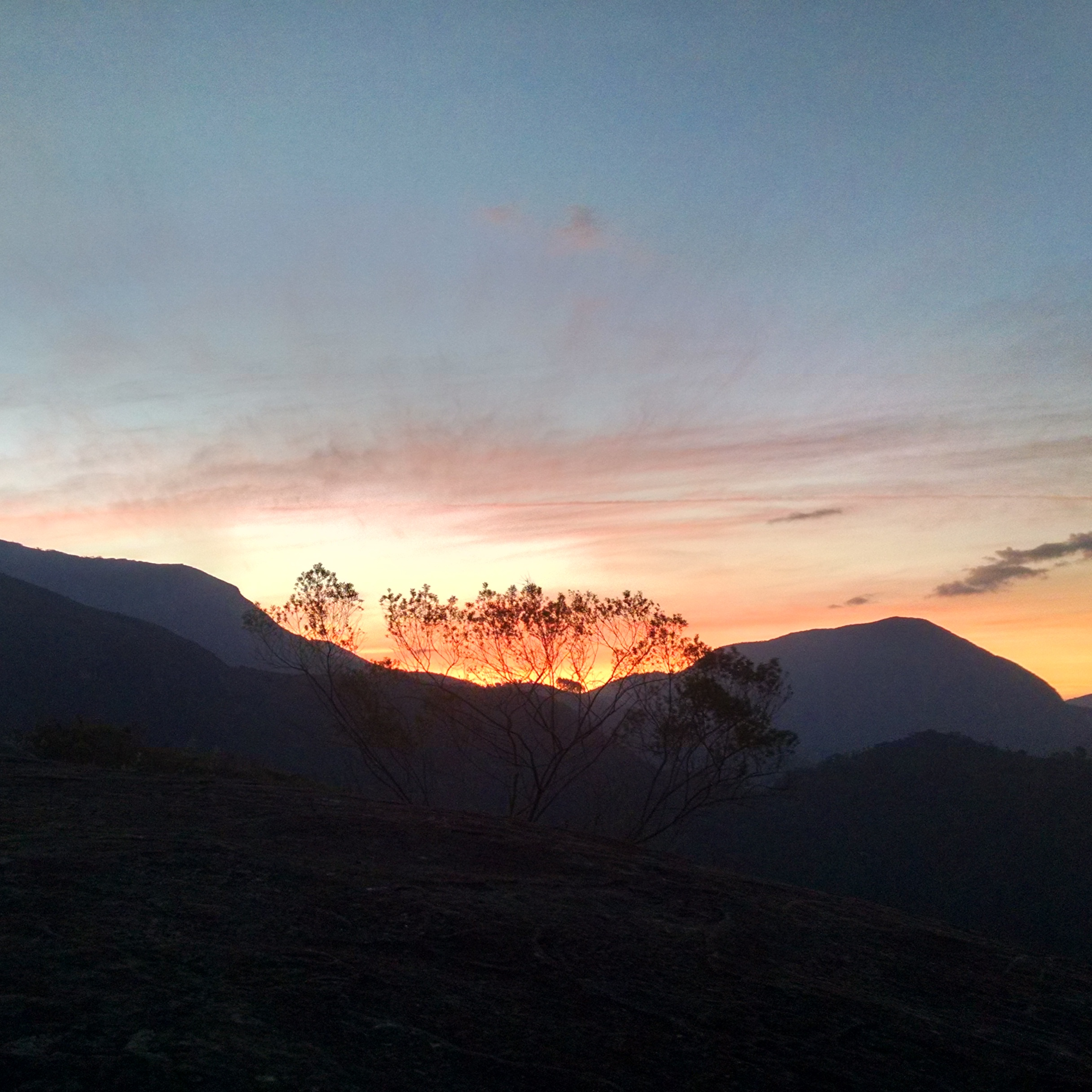 PNMMT - Parque Natural Municipal Montanhas de Teresópolis